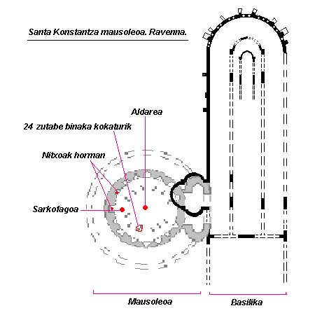 Mausoleoa Konstantino I.aren alabarentzat eraikia. Oinplanta zentralizatua.